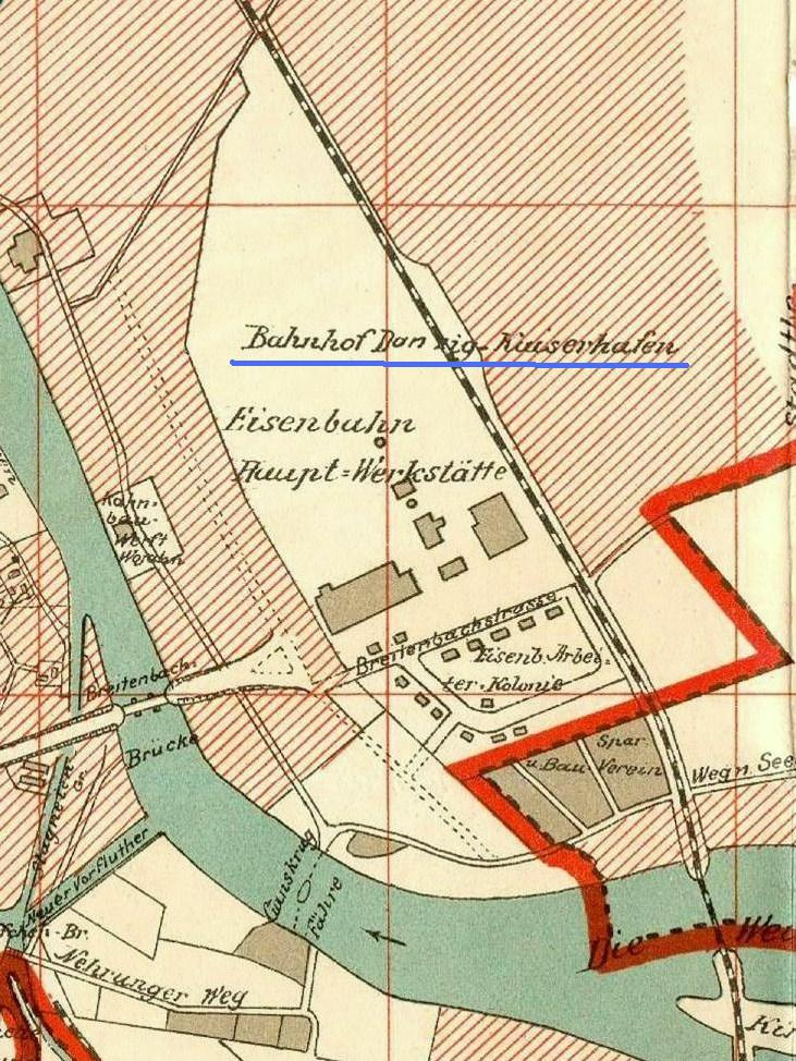 Gdańsk Przeróbka na planie z 1912 r. Z niebieskim podkreśleniem stacja kolejowa Gdańsk Kanał Kaszubski (Bahnhof Danzig Kaiserhafen).